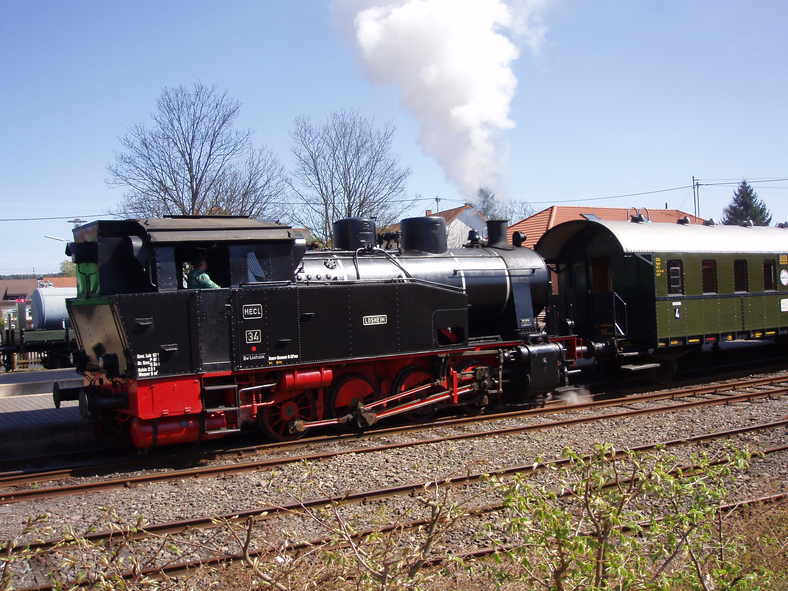 Museumszug in Losheim